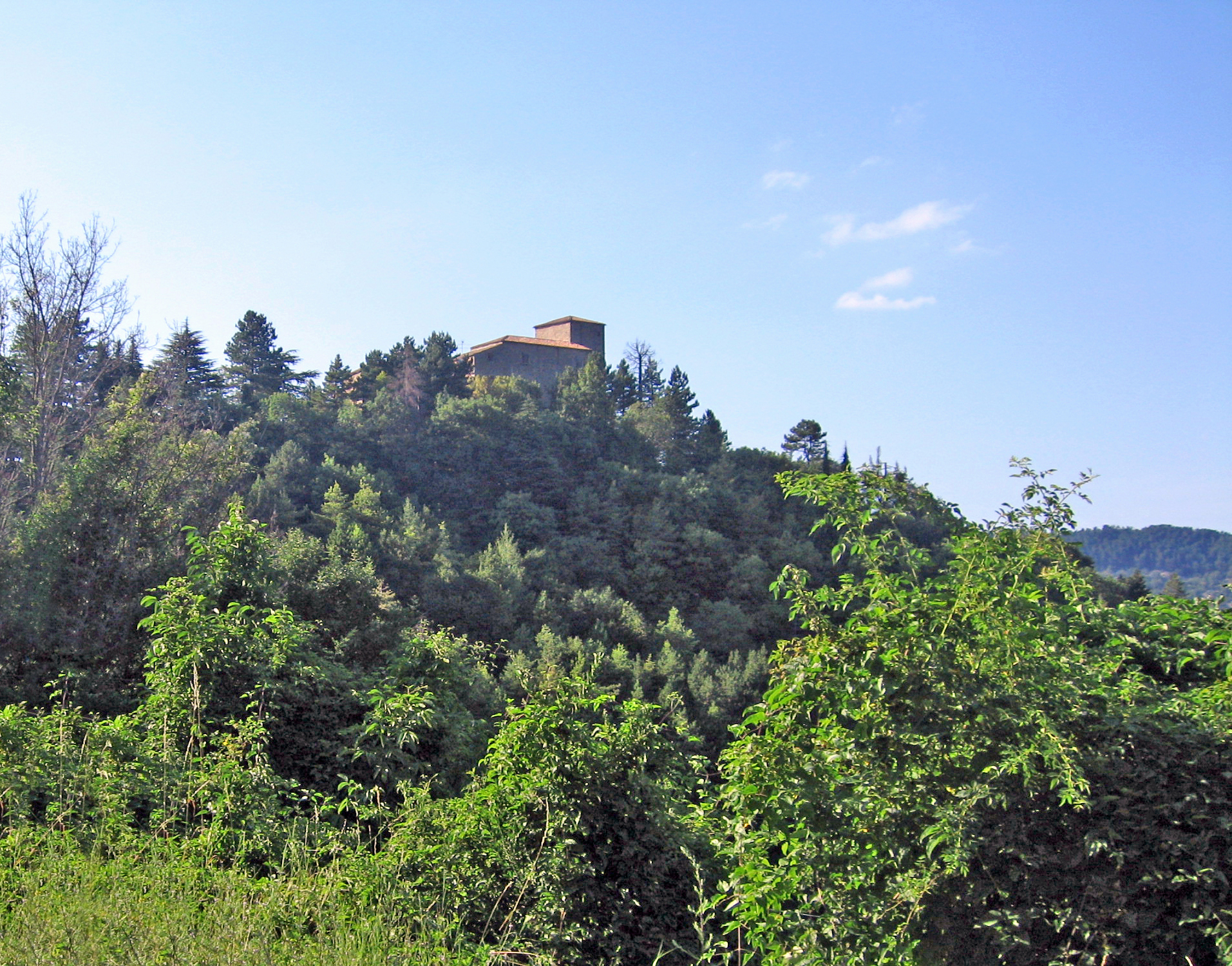 Panorama del castello di Ravarano